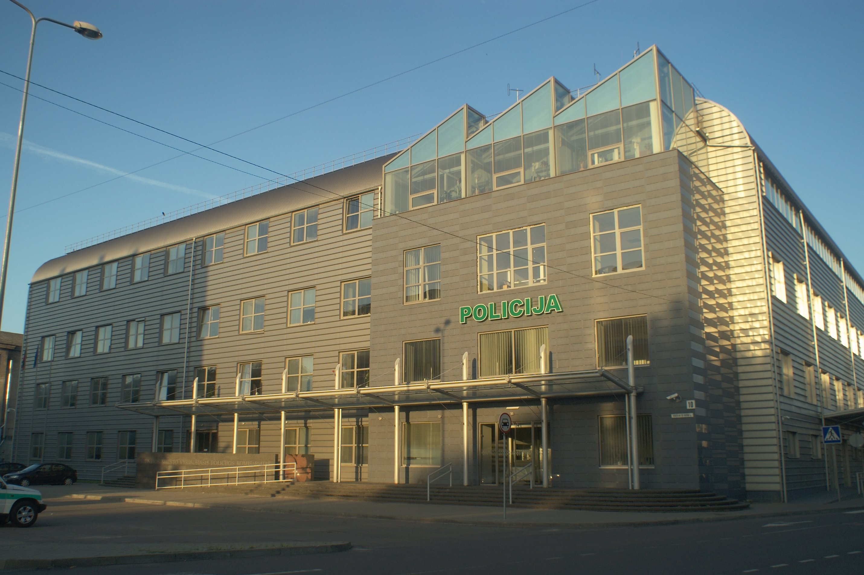 Vilniaus miesto vyriausiasis policijos komisariatas